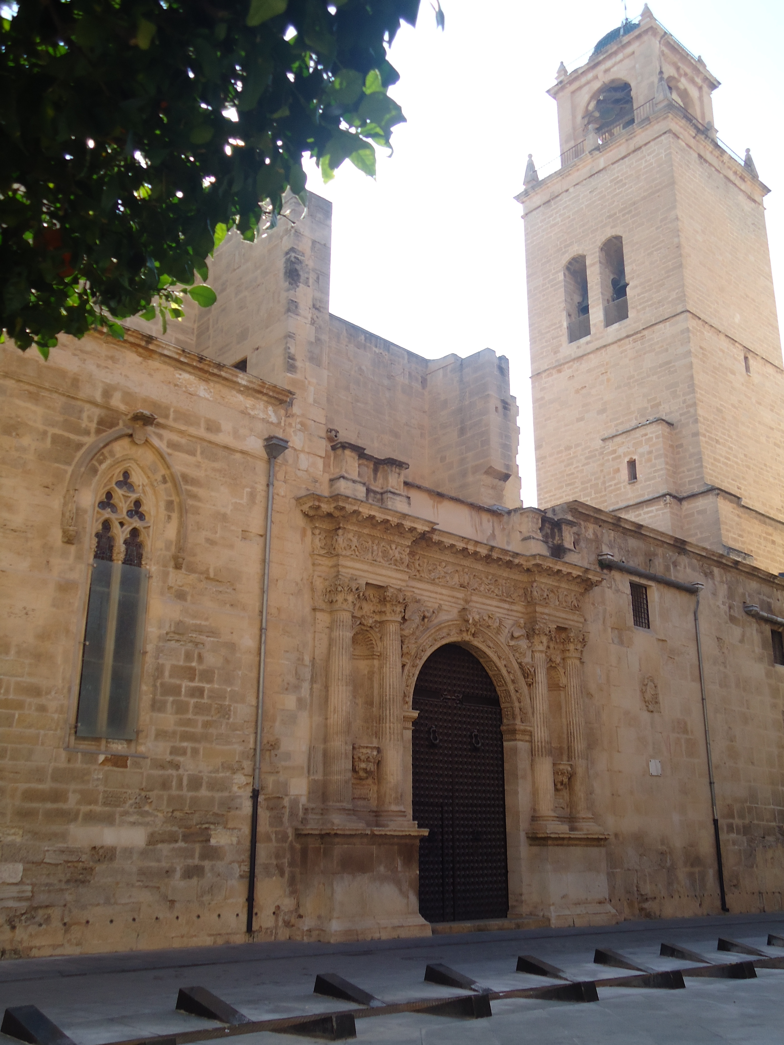 Portada de la Anunciación de la Catedral de Orihuela, Comunidad Valenciana, España.